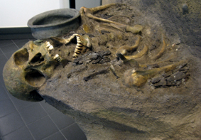 Beschreibung= Spätslawisches Körpergrab im Großdiorama